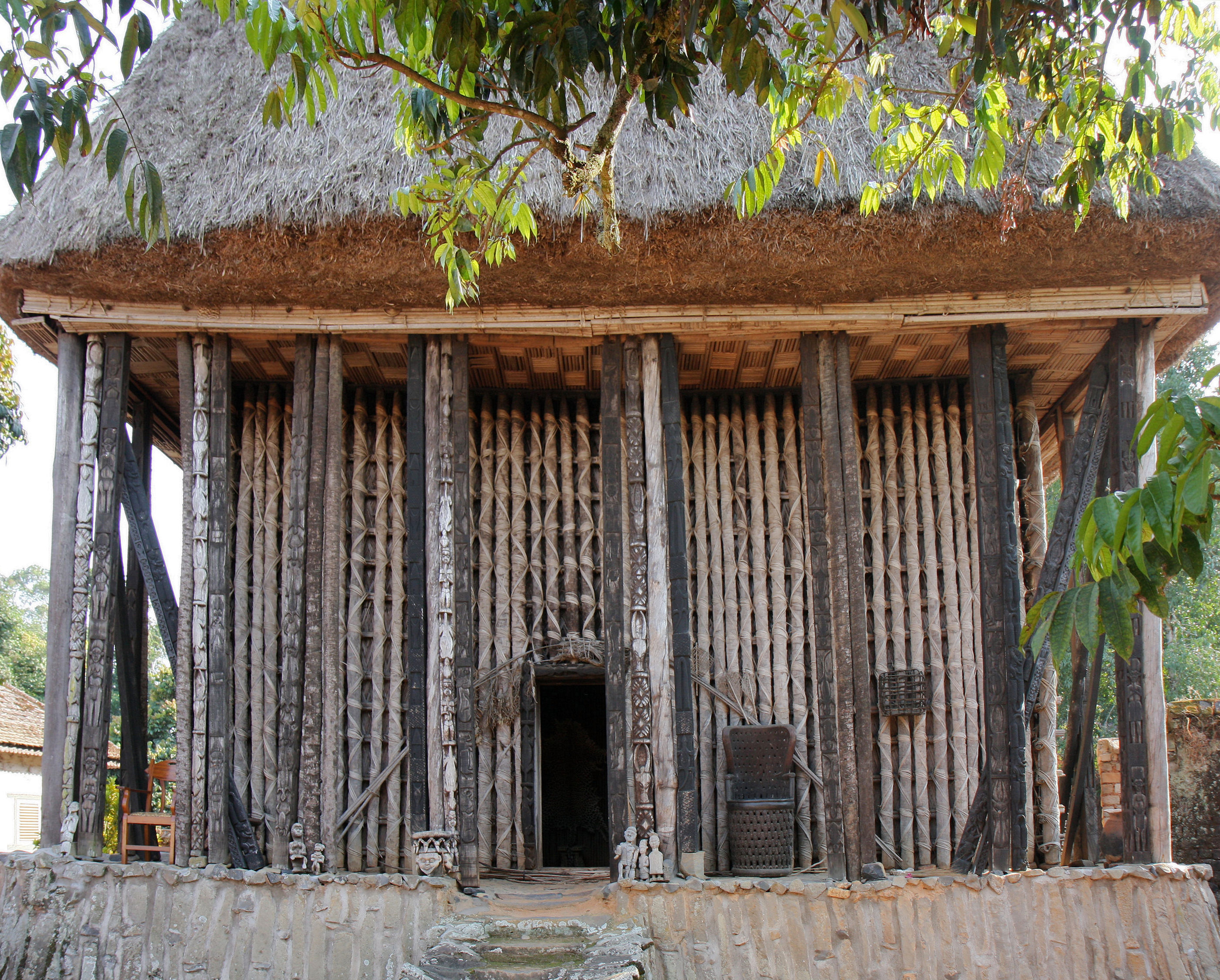 Chefferie de Bafut au nord de Bamenda.L'ancienne case royale.